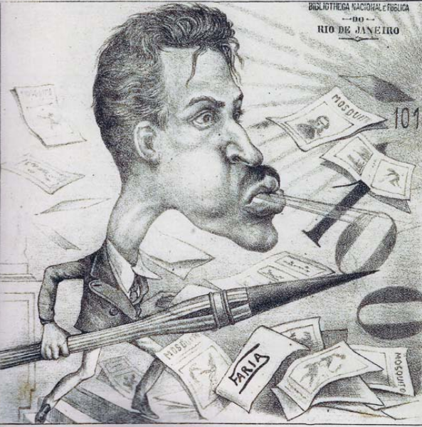 Auto retrato em caricatura